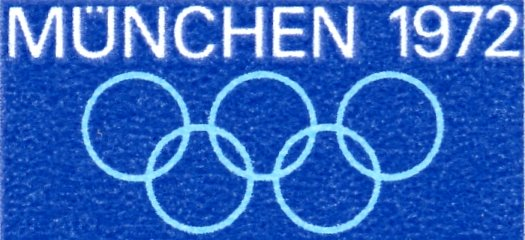 eingescannt von: User:Nightflyer eingescannt am: August 2006 Sondermarke aus Deutschland zur Olympiade 1972 in Muenchen, Ausgabe 1969, Segeln *Ausgabepreis: 50 + 25 Pfennig *First Day of Issue / Erstausgabetag: 4. Juni 1969 *Auflage: 7.130.000 Stück *Entwurf: Schmidt *Druckverfahren: Rastertiefdruck Michel-Katalog-Nr: Ländercode-MiNr: 590 This is a retouched picture, which means that it has been digitally altered from its original version. Modifications: {1 }.